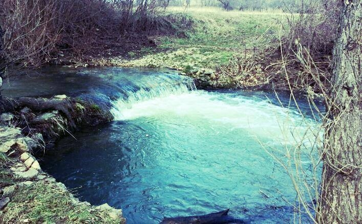 lumi Tabanovacka Reka/bajka Srpski (latinica): Tabanovacka Reka/bajka